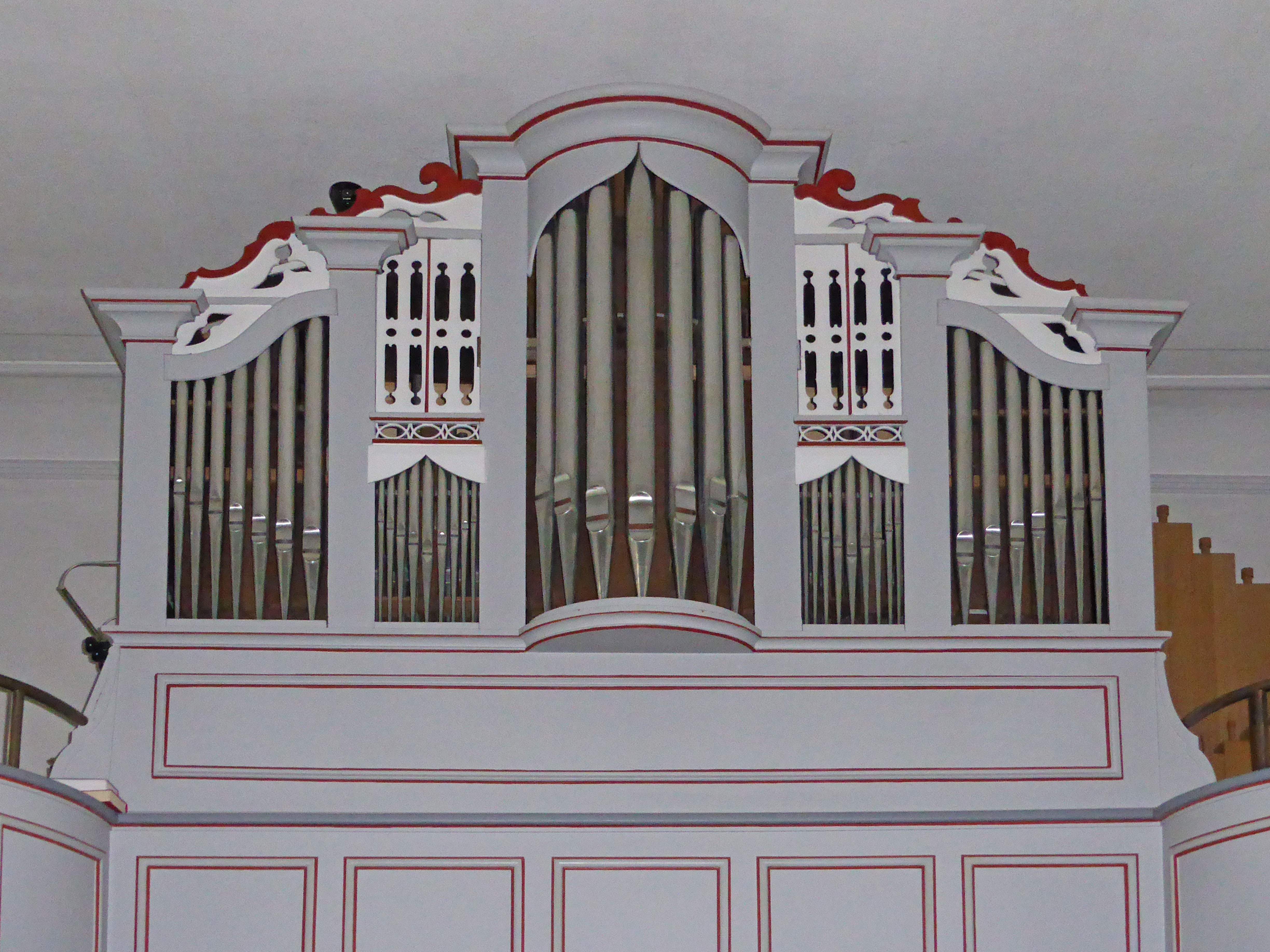 Orgel in der katholischen Kirche "Unbefleckte Empfängnis Mariä" in Grasdorf.